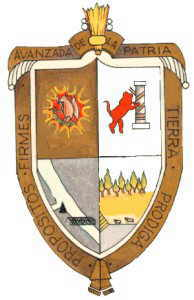 Escudo del municipio de Acuña, Coahuila